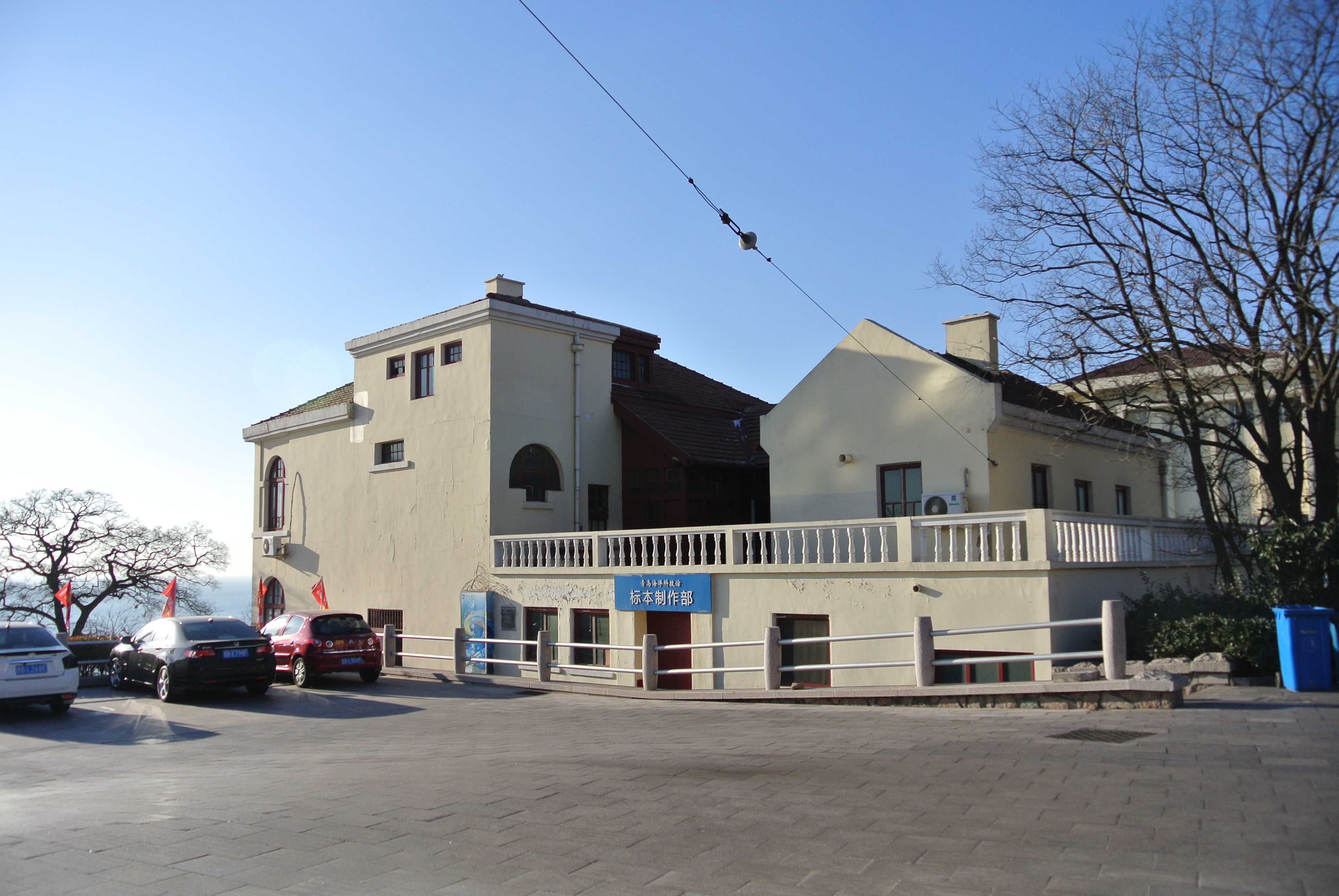 胶海关副税务司艾瑞时住宅旧址